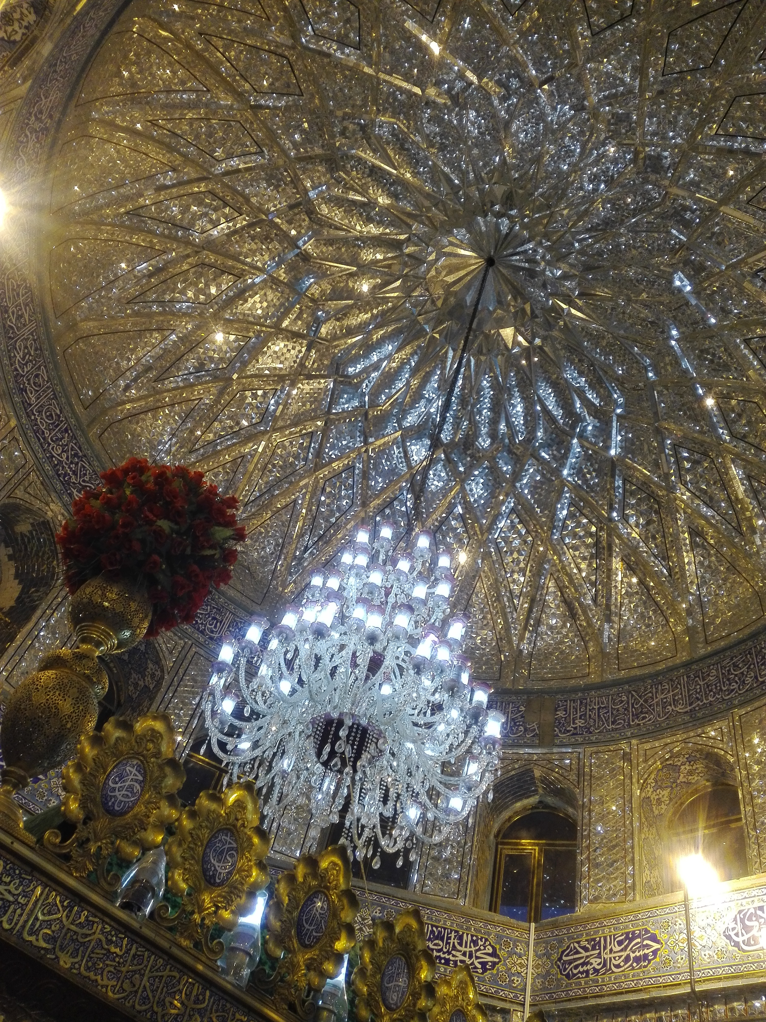 گنبد امام زاده علی صالح